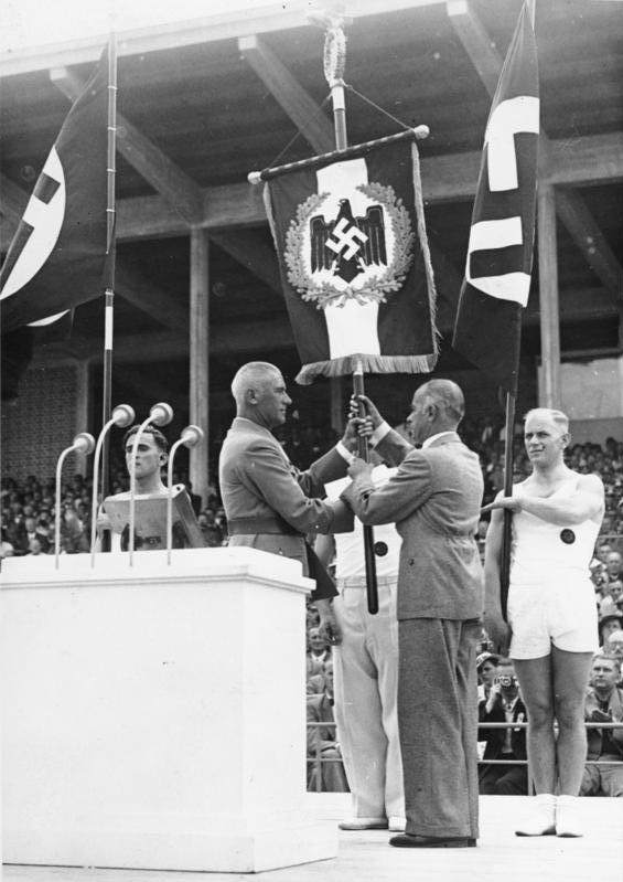 Die feierliche Eröffnung des Deutschen Turn- und Sportfestes. UBz: Am Schlusse seiner Eröffnungsansprache übergibt der Schirmherr des Festes, Reichinnenminister Dr. Frick dem Reichssportführer Staatssekretär von Tschammer und Osten im Auftrag des Führers das neue Banner des Reichsbundes für Leibesübungen, das den Adler von Goldlorbeer umgeben im roten Felde zeigt. Scherl- Bilderdienst/ 51293/ 28.7.1938